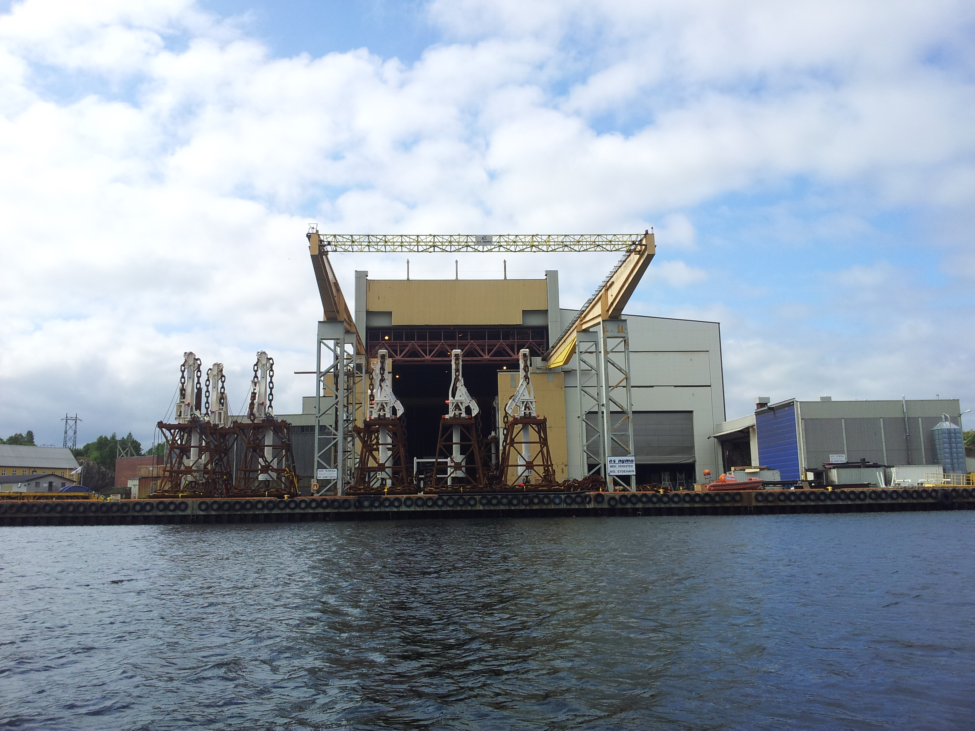 Nymo Eydehavn, tatt fra Tromøysund